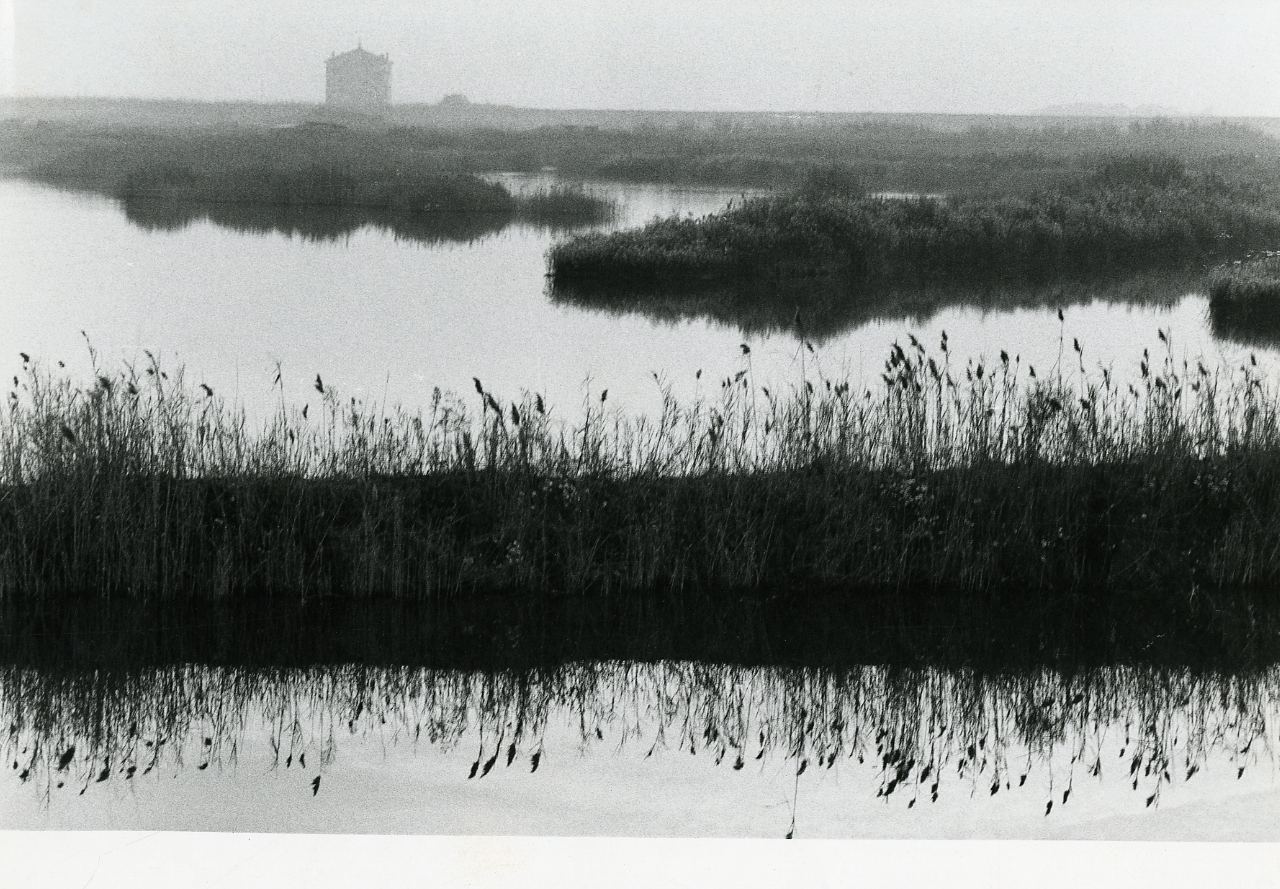 Servizio fotografico : Bondeno, 1974 / Istituto di fotografia Paolo Monti. - Stampe: 4 : Positivo b/n, gelatina bromuro d'argento/ carta, 24x30. - ((Al verso delle stampe manoscritto: "Istituto di fotografia Paolo Monti", segue numeor di negativo corrispondente: 2705bis/10, 2705bis/13, 2685/26, 2685/35. Sul coperchio della scatola, manoscritto a pennarello: "Architettura / Lombardia Veneto".